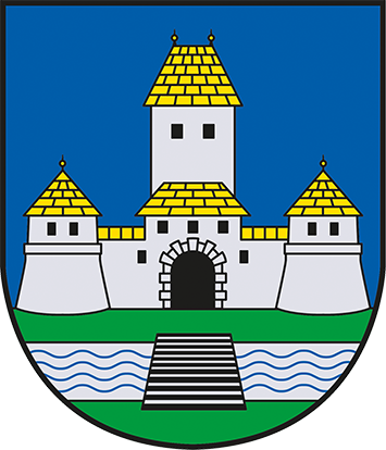 Kaiser Ferdinand I. verlieh dem Markt Weiz am 4. Feb. 1560 in Wien erstmals ein Wappen. Mit der Neugründung der Stadt Weiz am 1.1.2015 gingen sowohl das alte Recht der Stadtgemeinde Weiz als auch das Recht der Gemeinde Krottendorf, ein Wappen als Hoheitszeichen zu führen, verloren. Mit Beschluss der Steiermärkischen Landesregierung vom 2. Juni 2016 wurde der neuen Stadtgemeinde Weiz das Recht zur Führung eines Gemeindewappens mit Wirkung vom 15. Juni 2016 verliehen. Das Wappenbild blieb erhalten; das alte Wappen entsprach jedoch in seiner Farbgebung nicht den heraldischen Farbregeln.